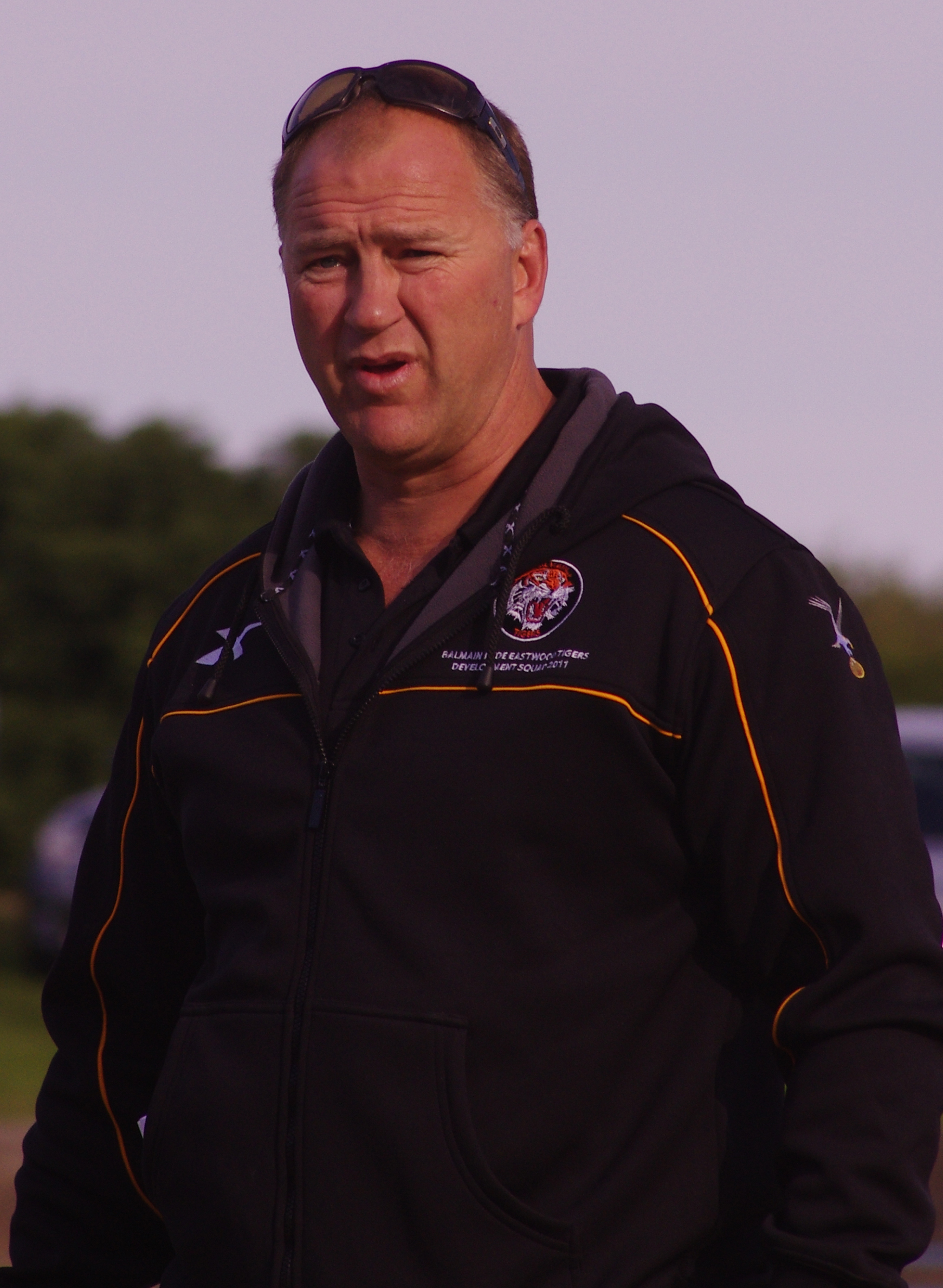 PAUL SIRONEN